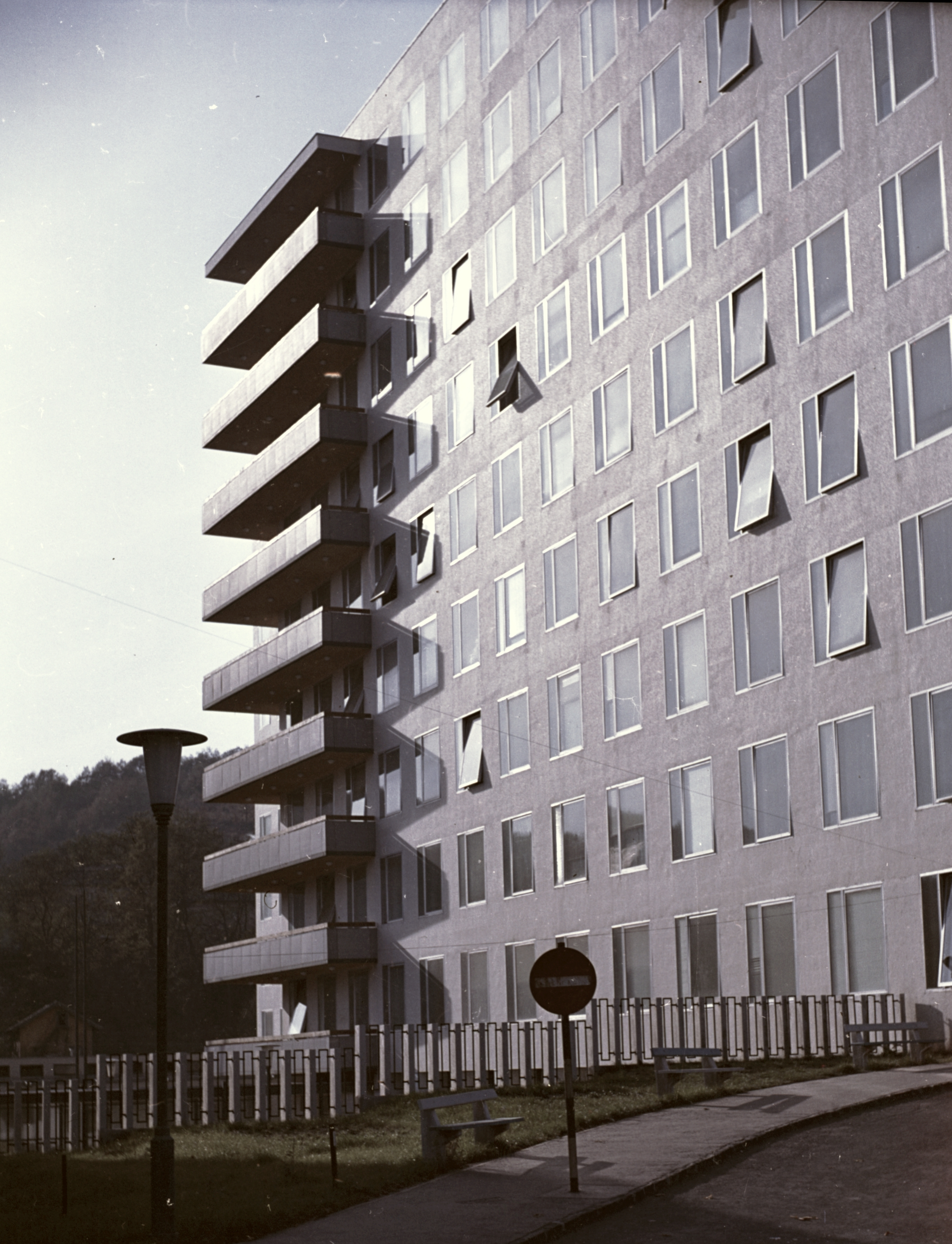 Megyei Kórház. Location: Hungary Tags: colorful, medical institution Title: Megyei Kórház.